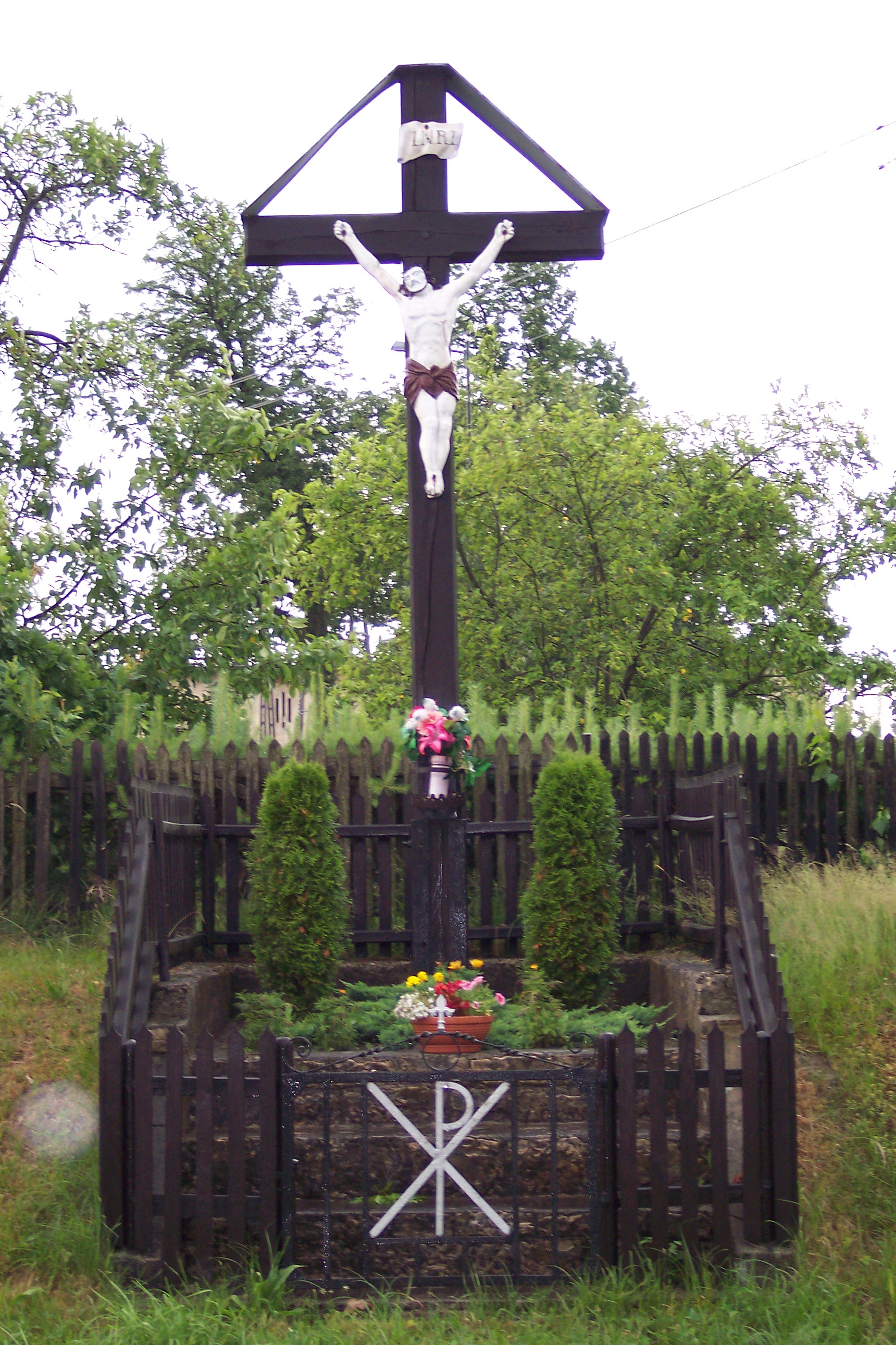 Krzyż przydrożny w Pruskowie (woj. opolskie)